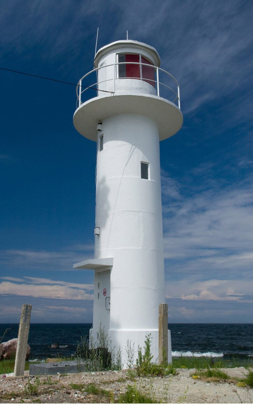 Vergi tulepaak